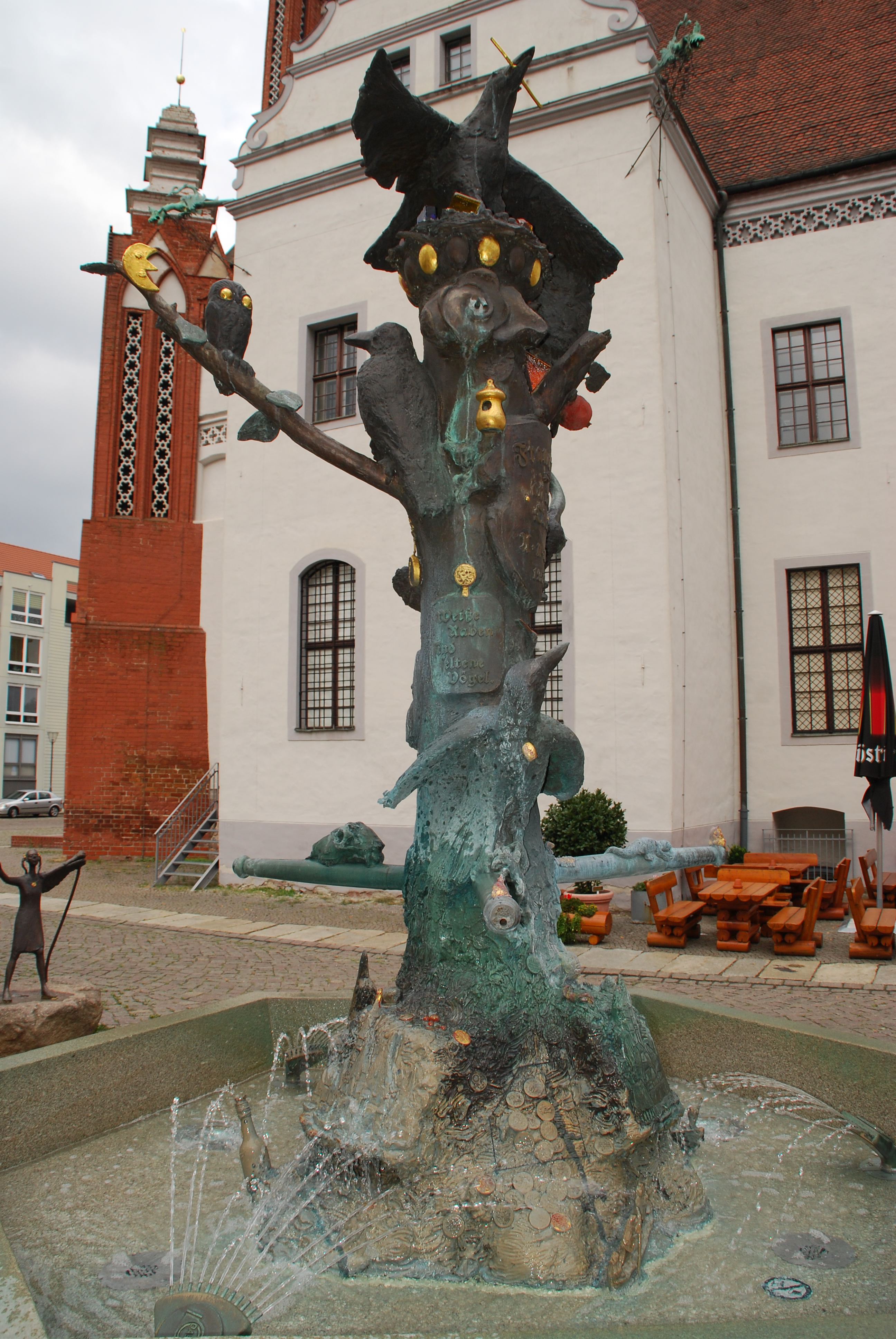 Sieben Raben Brunnen in Frankfurt (Oder), auf dem Marktplatz, zwischen Rathaus und den Häusern "Sieben Raben"